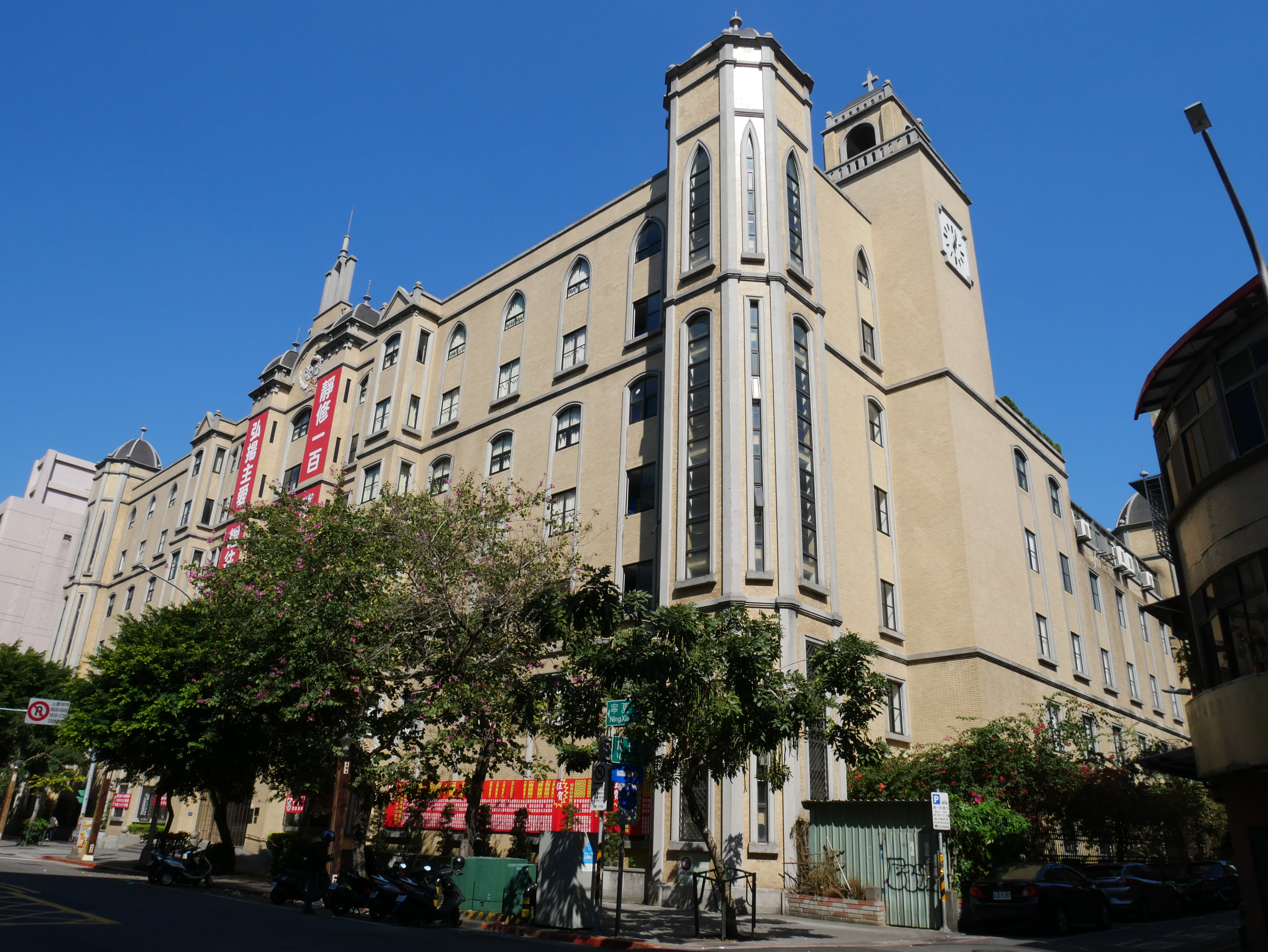 臺北市私立靜修女子高級中學，臺北市大同區建成次分區雙連里